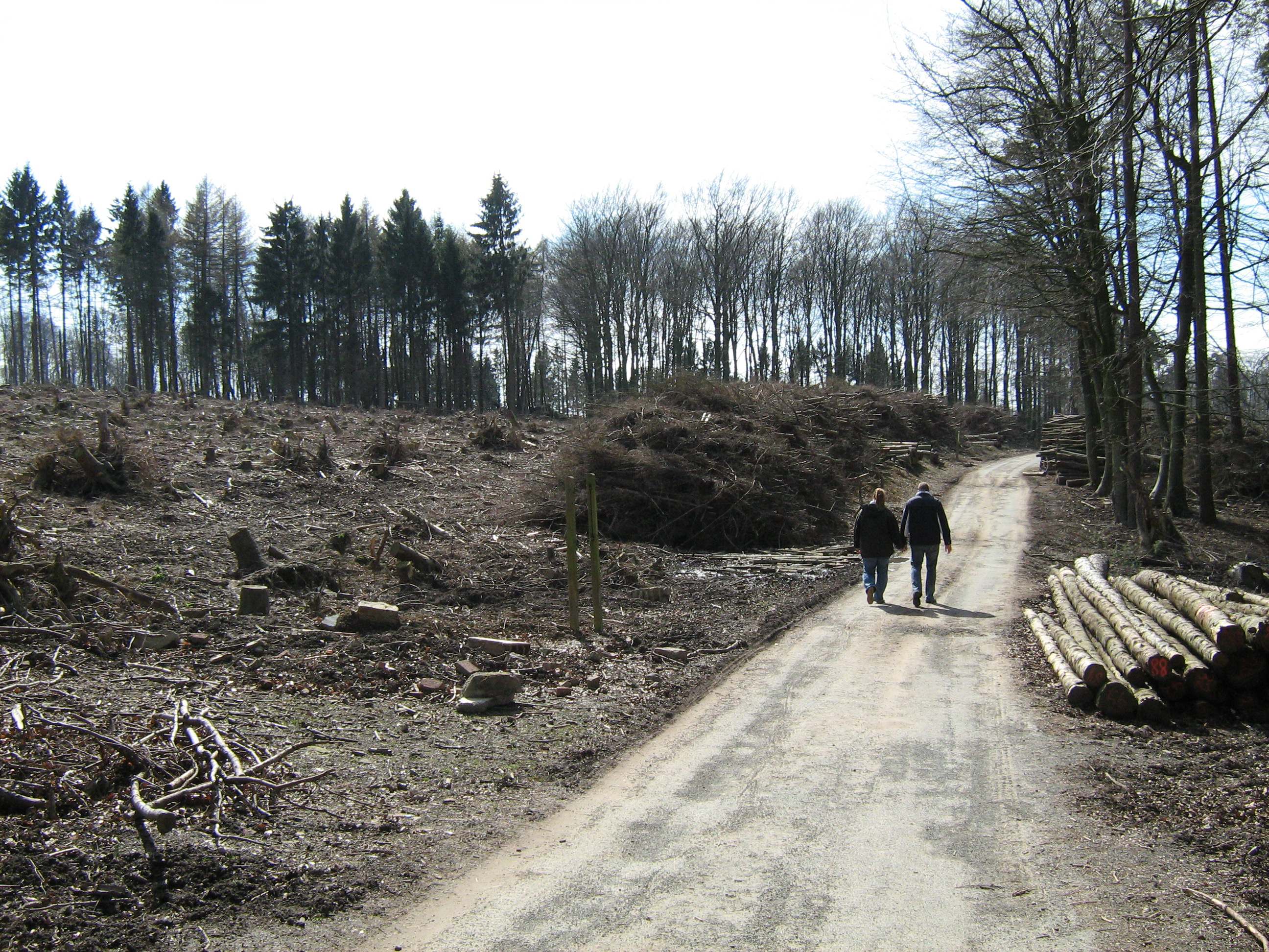 Wald u. Diederichsburg bei Melle im Frühjahr 2008.